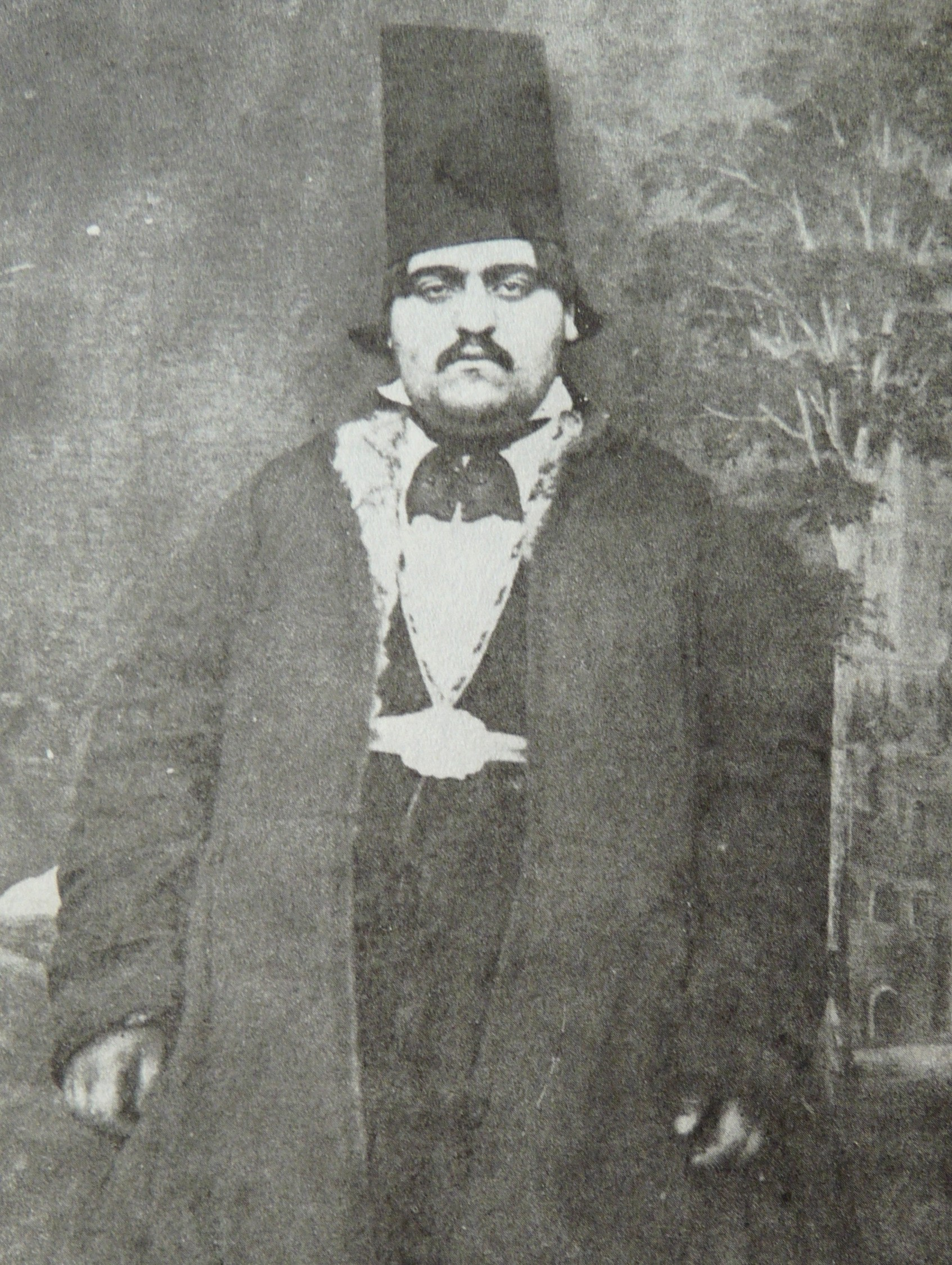 محمدتقی میرزا پسر محمدشاه قاجار